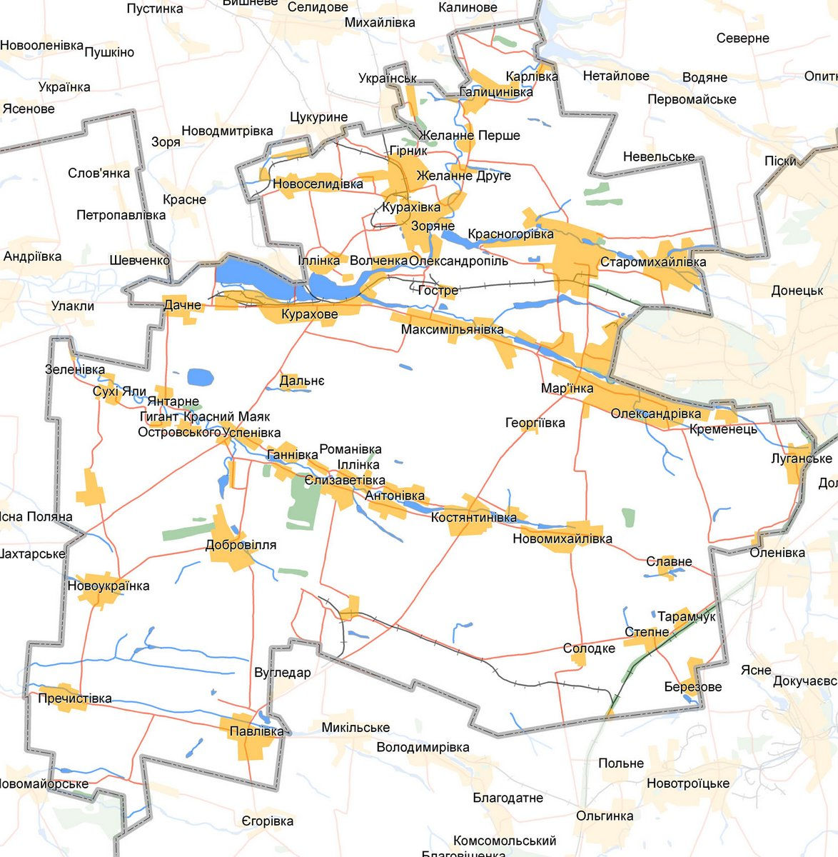 Map